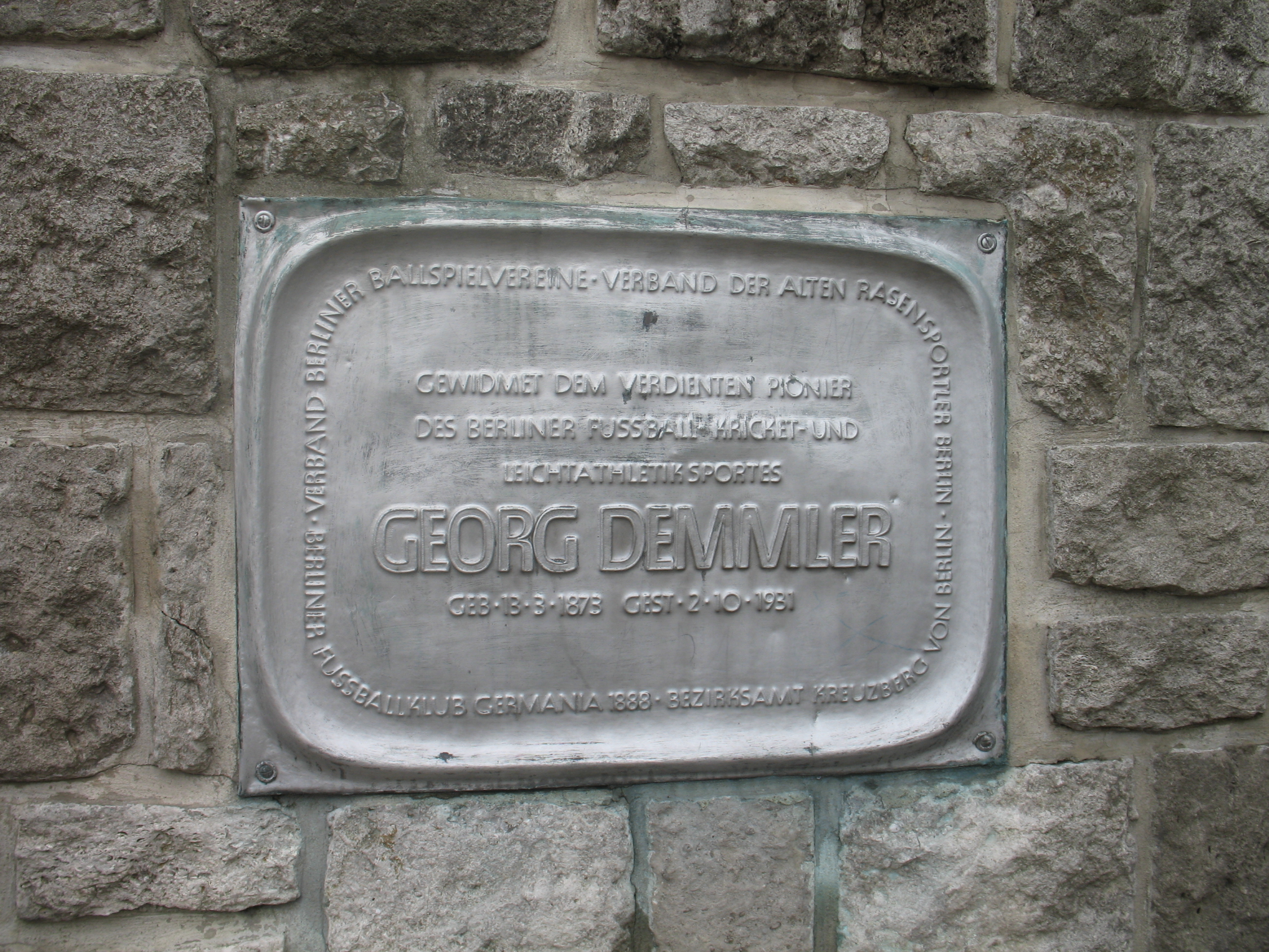 Gedenktafel für Georg Demmler am Kreuzberger Katzbachstadion.